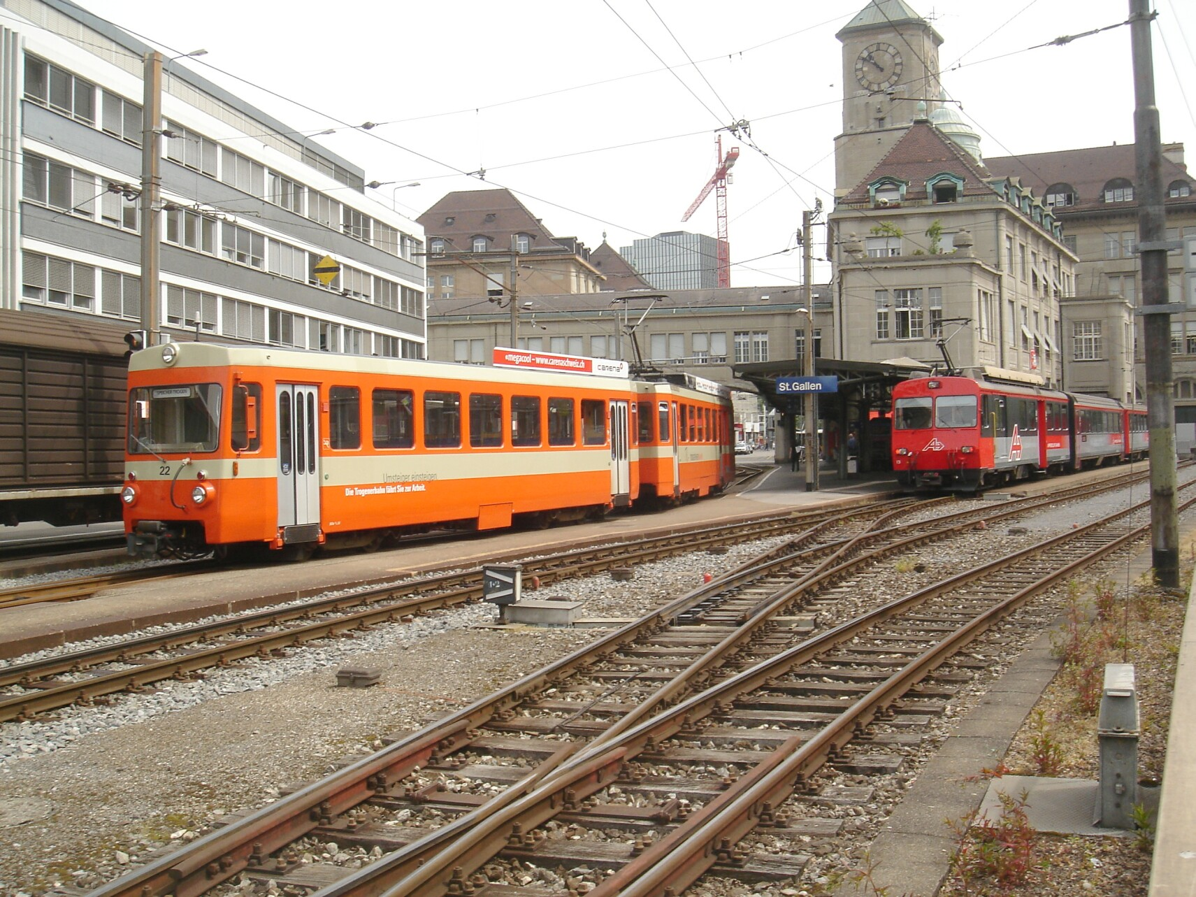 Be 4/8 22 der Appenzeller Bahnen (ex Trogenerbahn) im St. Galler Nebenbahnhof, daneben der BDeh 4/4 13 mit B 295 und ABt 113. Der Fusionsbeschluss ist noch frisch und hat noch keine Spuren auf den Fahrzeugen hinterlassen